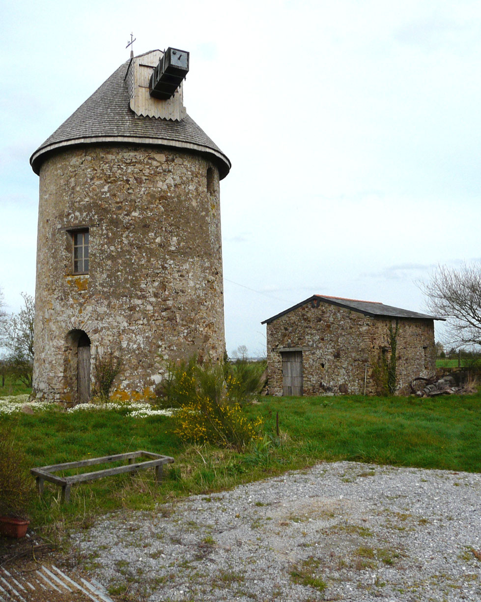 Moulin de la Quétraye, Mésanger (44)